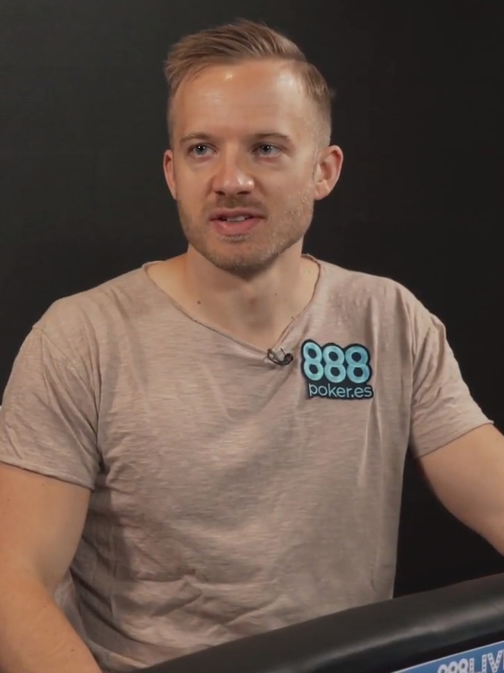 Martin Jacobson analyisiert eine Pokerhand